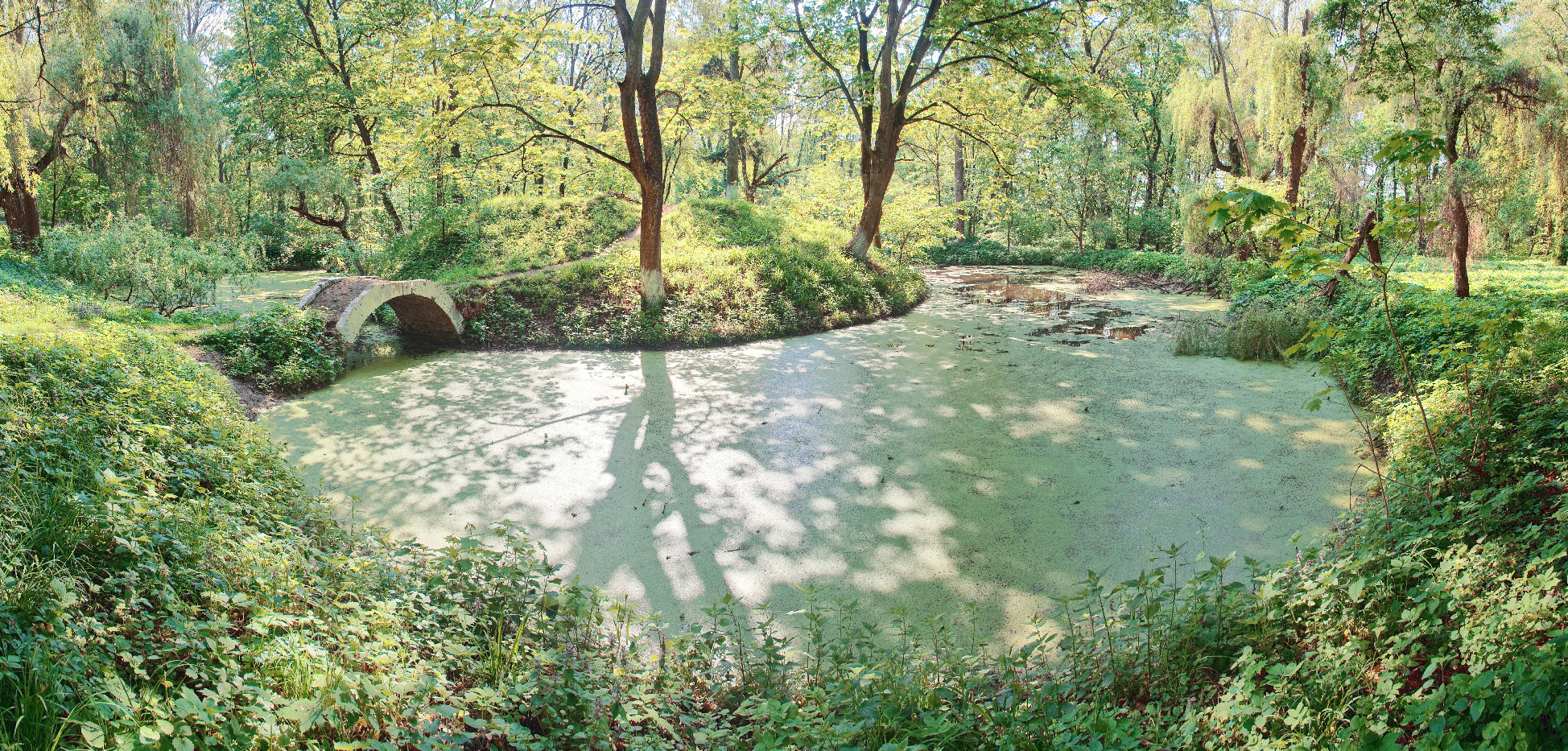 Новочорторийський, Любарський р-н, с. Нова Чортория